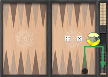 Ничья